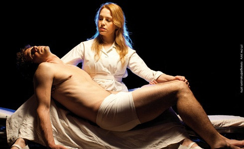 דנה זקס וגל פרציגר בהצגה "של מי החיים האלה", תיאטרון הבימה